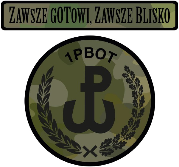 1 Podlaska Brygada Obrony Terytorialnej – oznaka rozpoznawcza na mundur polowy – 2019, Polska.